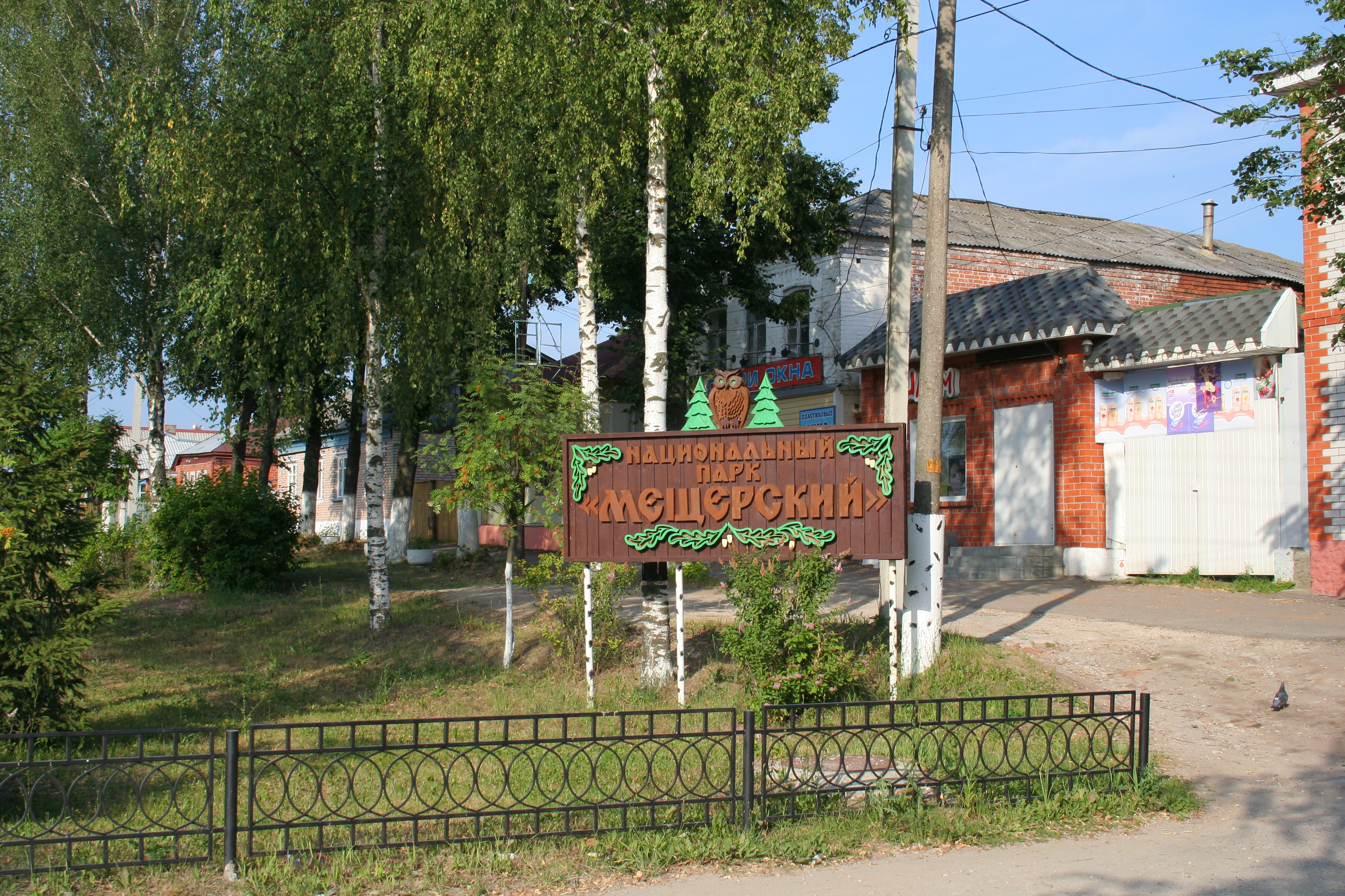 Stadt Spas-Klepiki (Oblast Rjasan, Russland). Erkennungszeichen zum Meschtschora-Nationalpark.